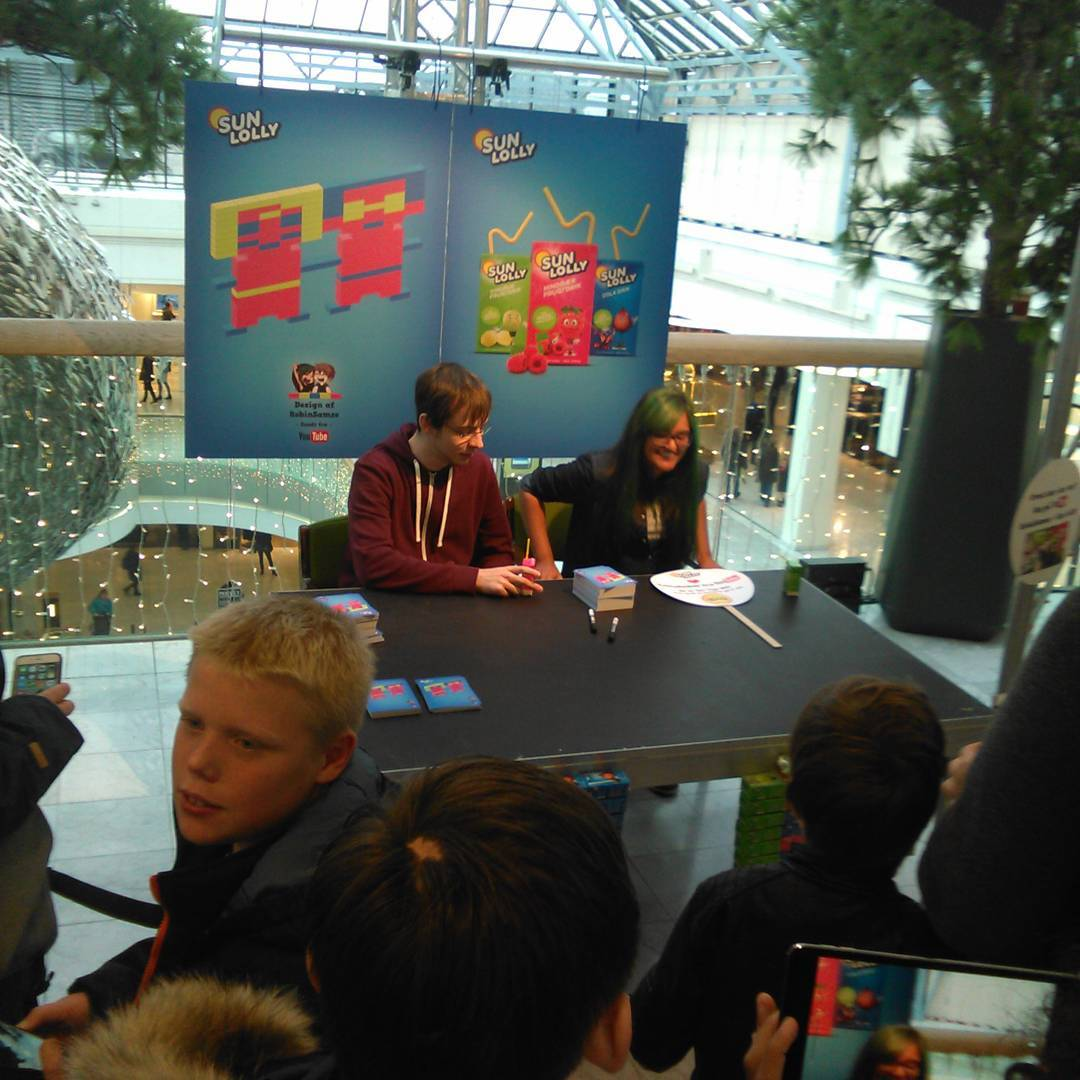 RobinSamse (Robin Madsen og Samrita Kaur) gør klar til at signere. Fisketorvet, 5. november 2016